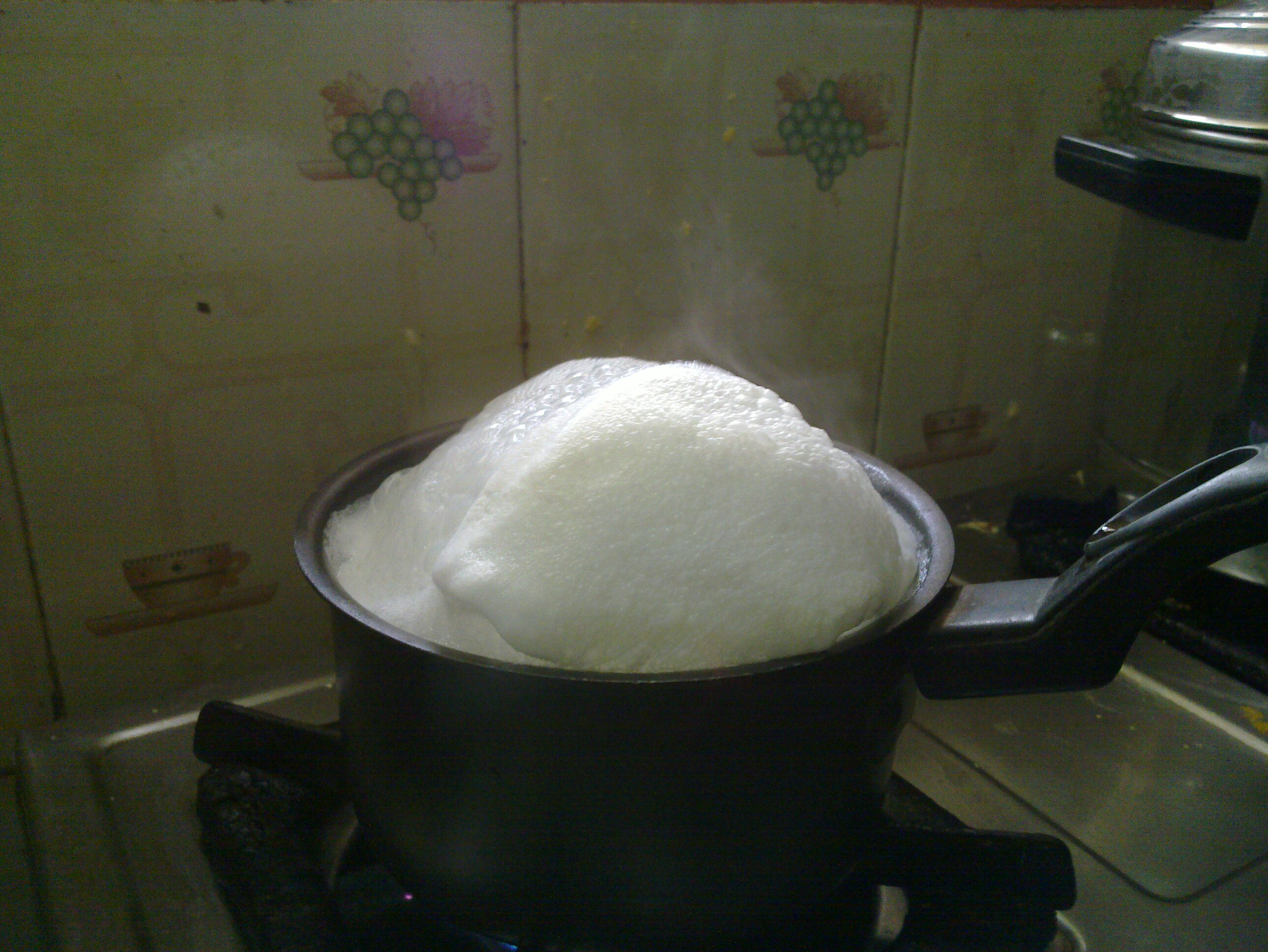 பால் காய்ச்சுதல்